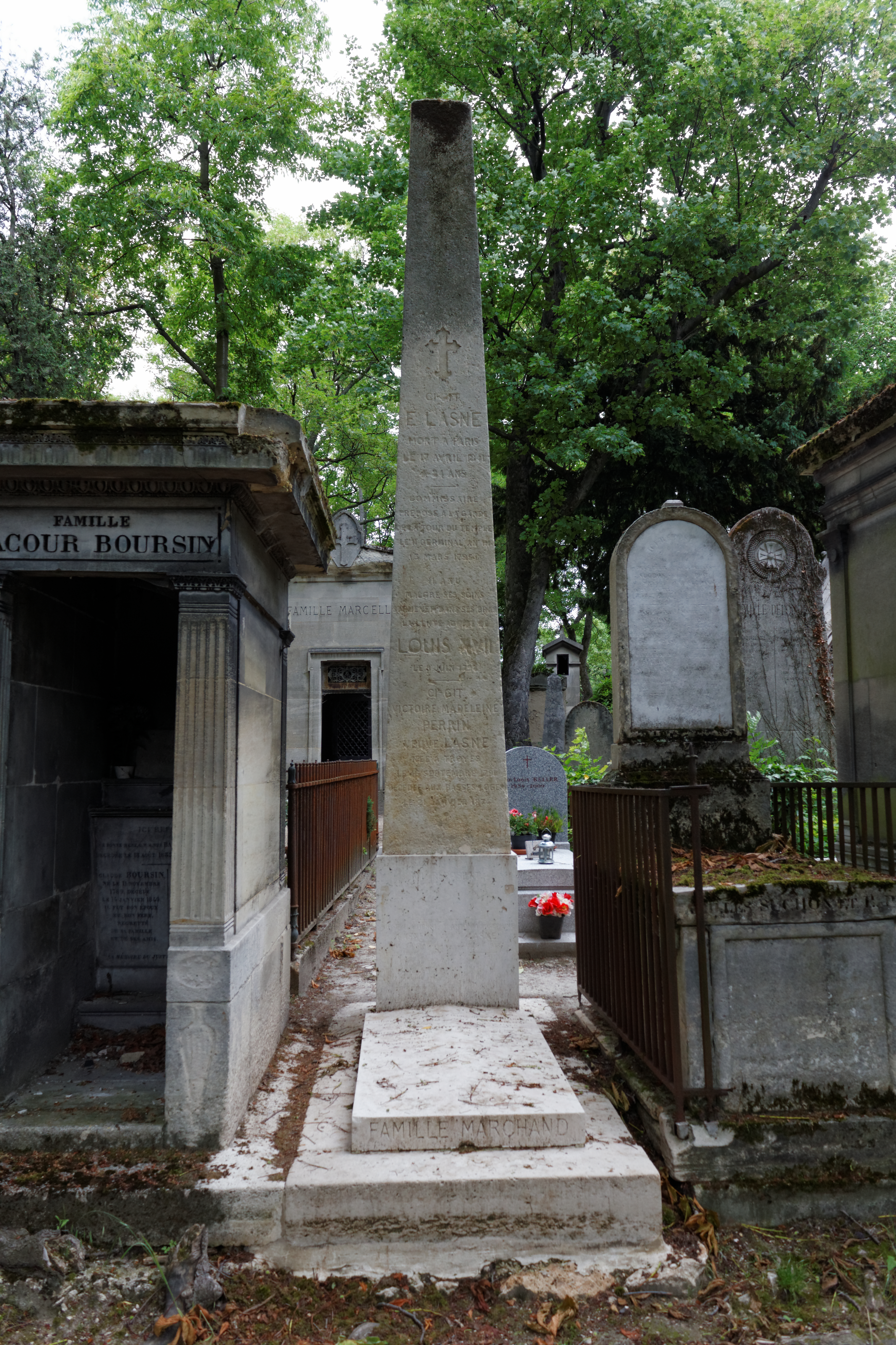 Sépulture d'Étienne Lasne (1757-1841), militaire et peintre en bâtiment français, connu pour avoir été le dernier gardien de Louis XVII à la prison du Temple ; et Anne-Marie Marchand (1927-2005), costumière française de cinéma. Monument en forme d'obélisque.